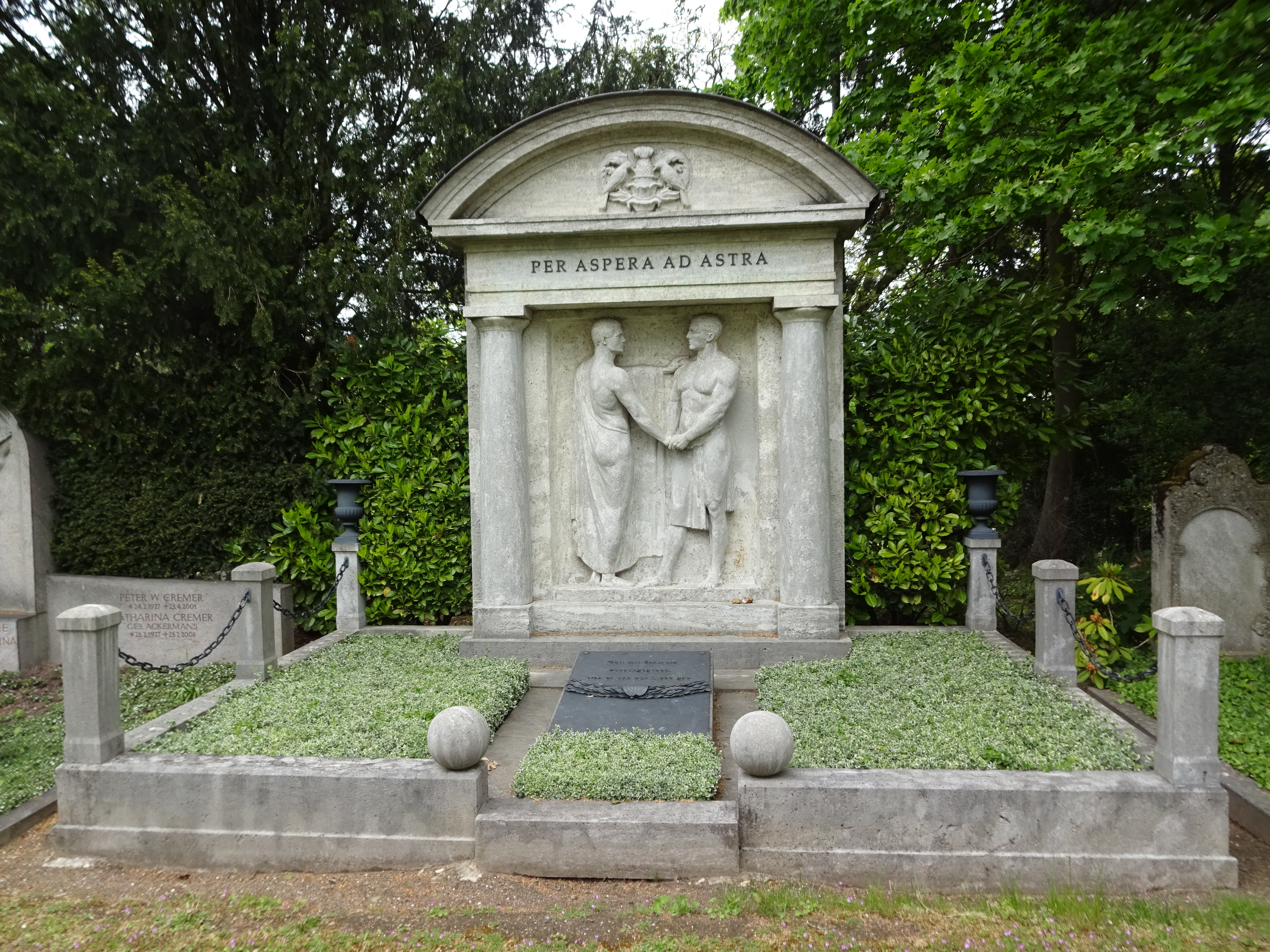 Grabstätte Familien Boldt und Frings "per aspera ad astra", Nordfriedhof Düsseldorf